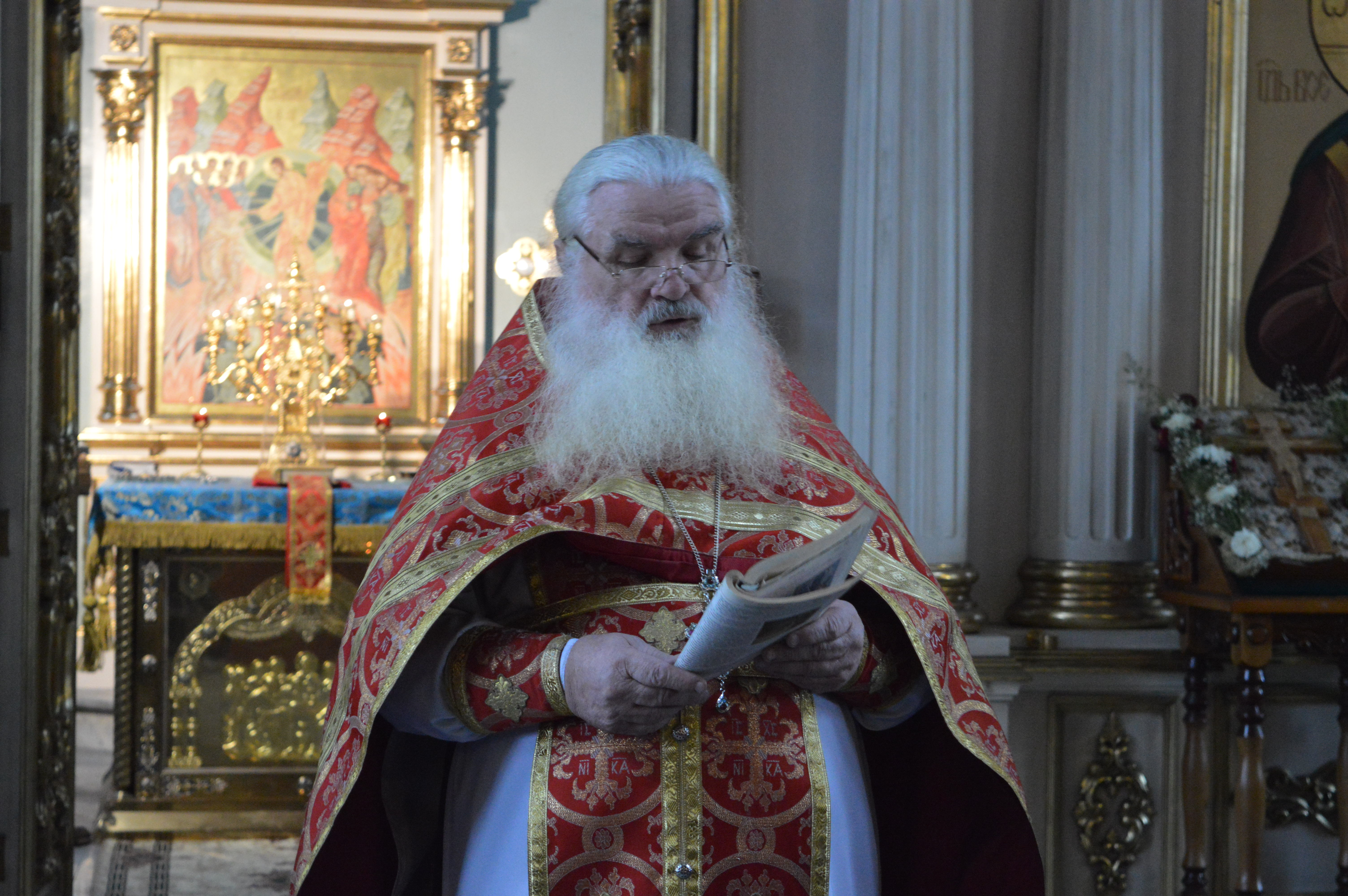 Настоятель храма